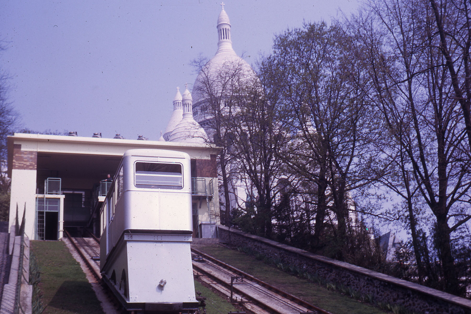 Funiculaire de Montmartre en 1963